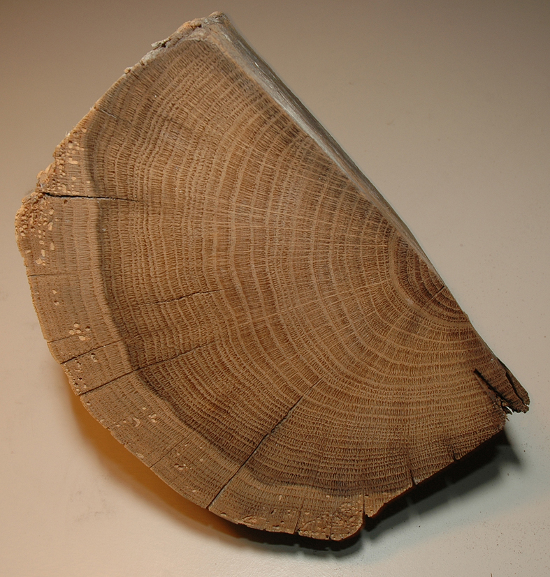 Sommige houtsoorten kunnen met dendrochronologisch onderzoek nauwkeurig gedateerd worden.